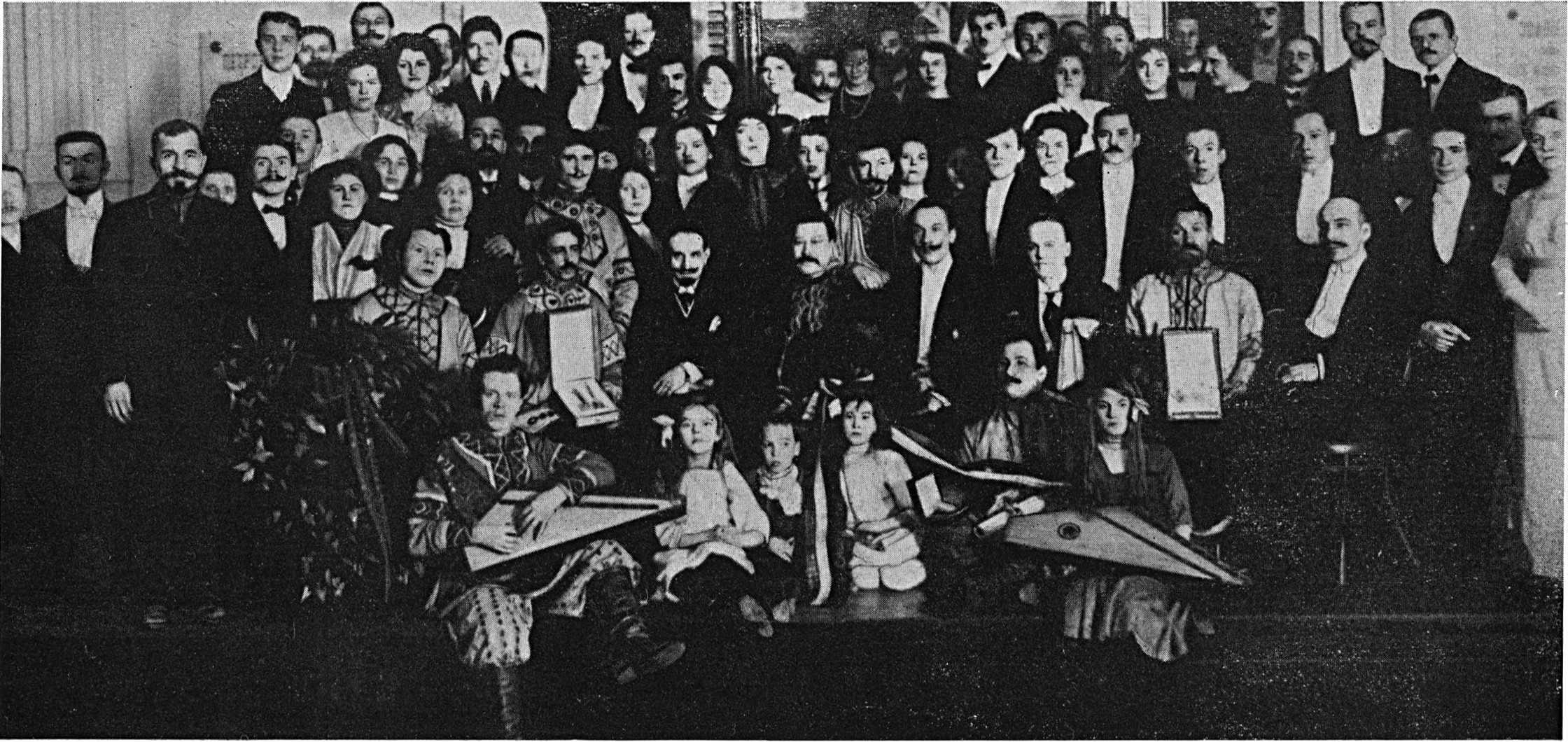 В.В. Андреев и артисты Великорусского оркестра на чествовании гусляра О.У. Смоленского. 1914 год.